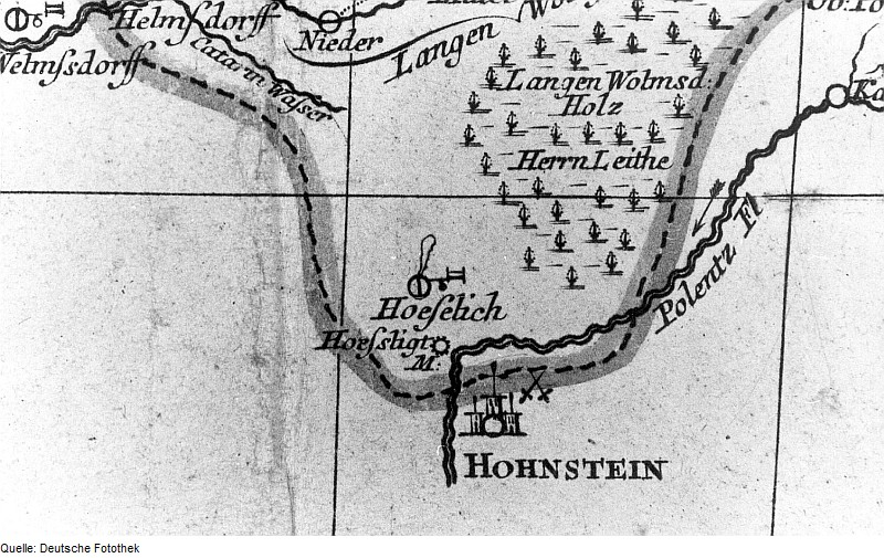 Original image description from the Deutsche Fotothek Stolpen-Heeselicht. Oberlausitzkarte, Schenk, 1759